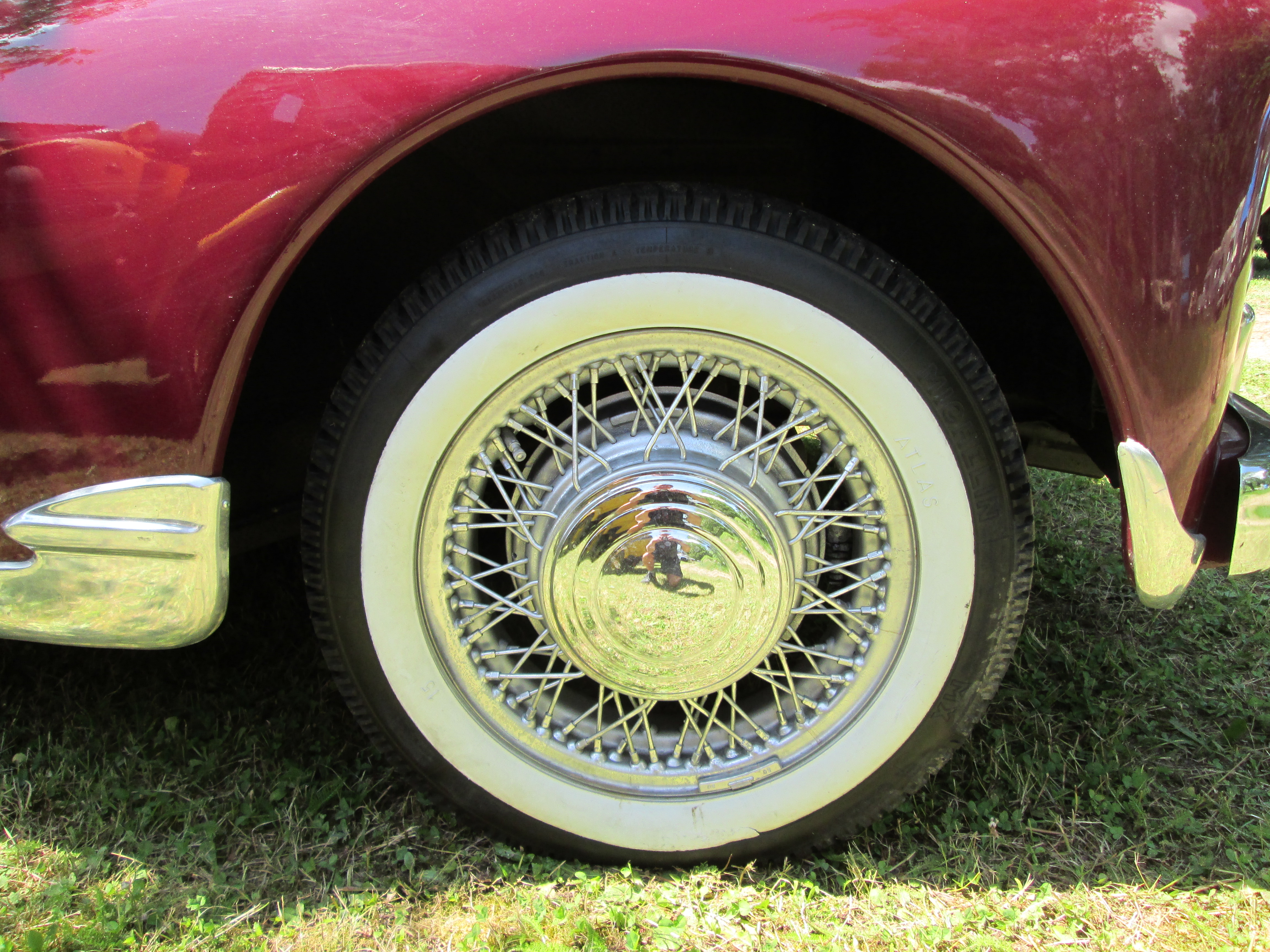 Peugeot 203 Cabriolet : roue avant.